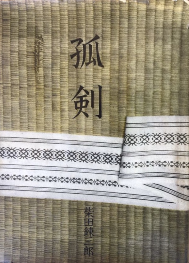 柴田錬三郎『孤剣』1962年初版 浪速書房刊